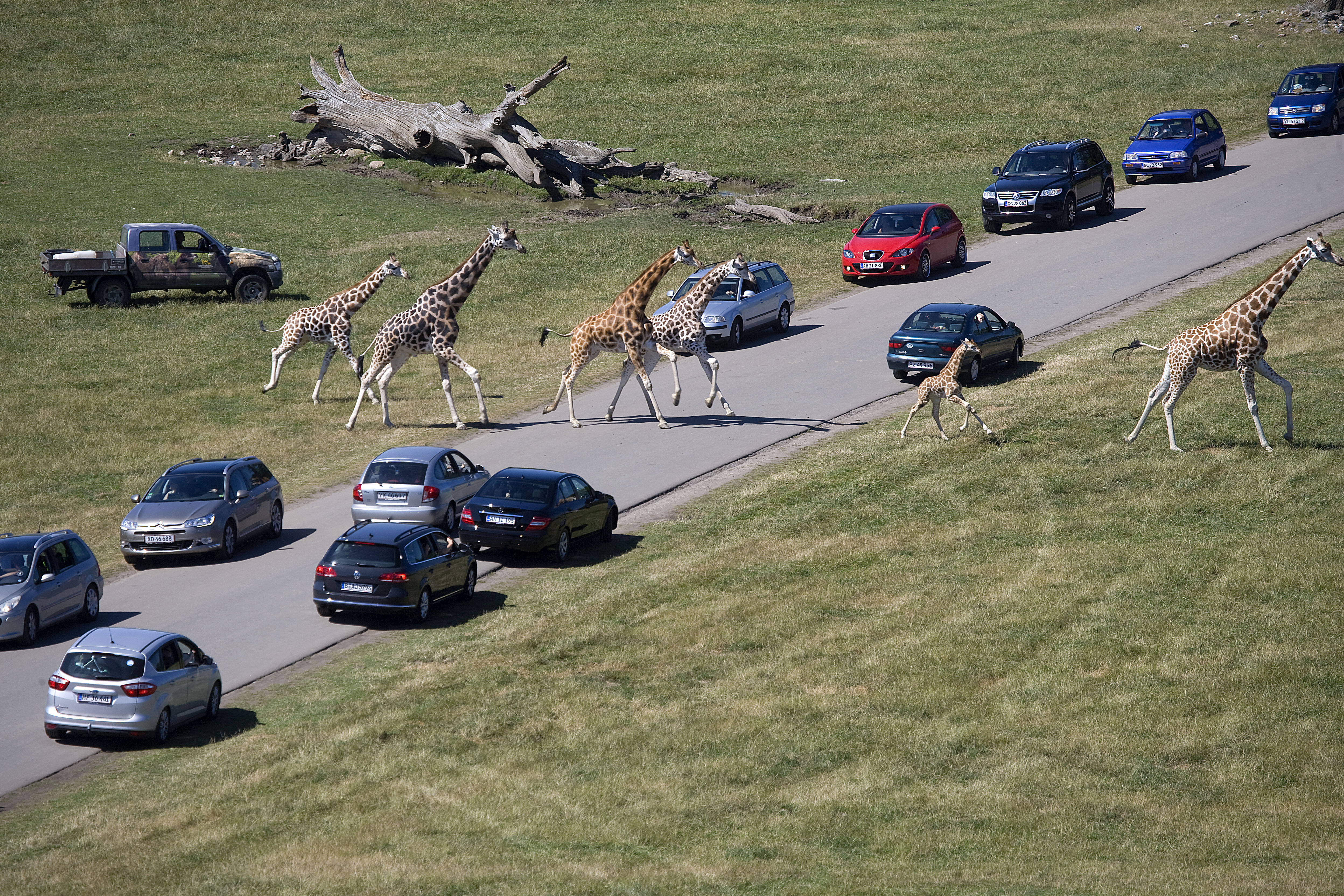 Knuthenborg Safaripark ligger på Lolland og har mere end 1200 dyr, der lever stort set frit.